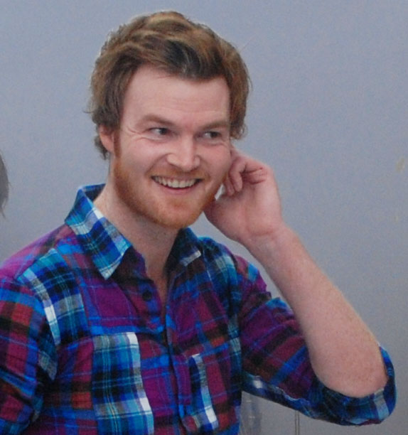 Claus Lillelund. Paricipant in "The X Factor 2009" TV-program in Denmark